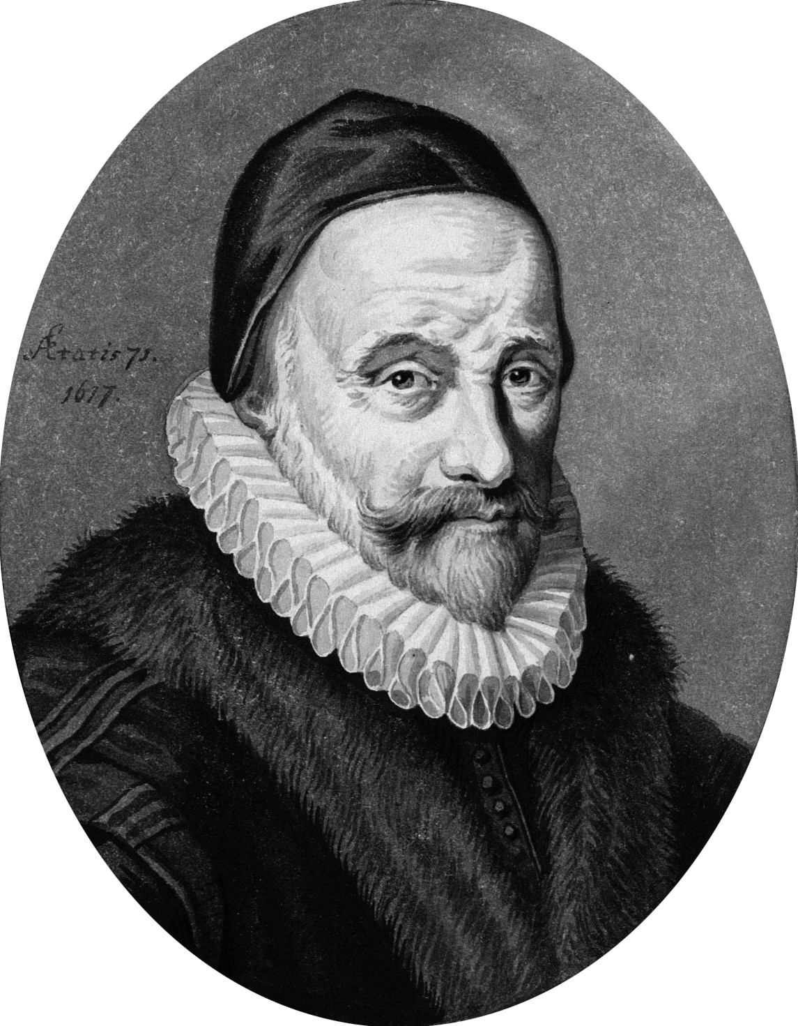 Cornelis Pietersz. Hooft (1547 / 01-01-1626) Burgemeester van Amsterdam. (naar een schilderij van Cornelis van der Voort, 1617-1622. Zie RKD )